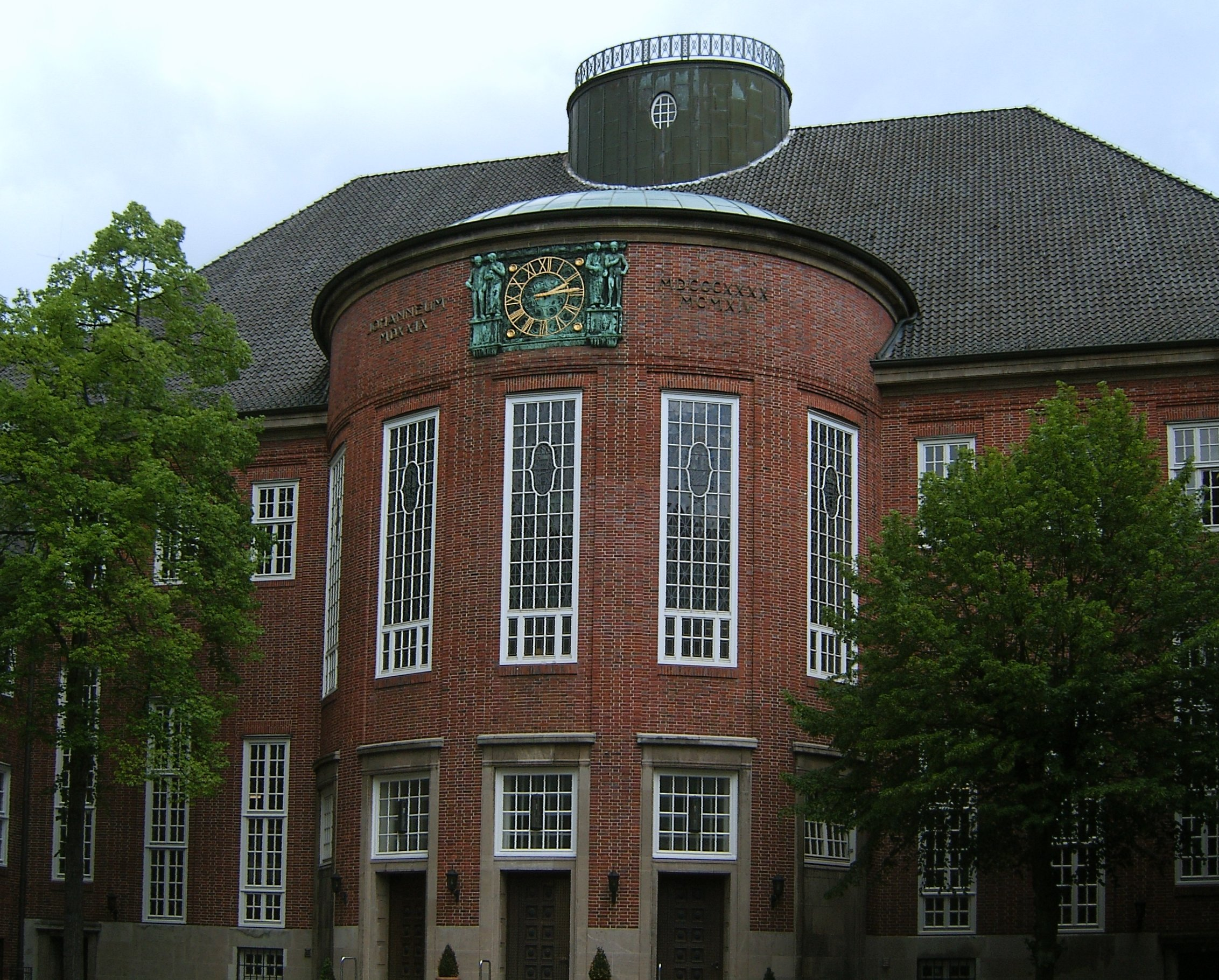 Hamburg, Winterhude, Johanneum